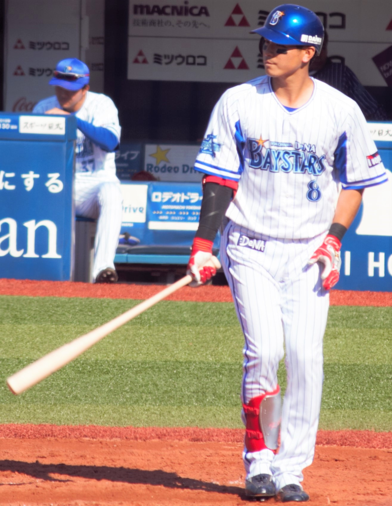 横浜DeNAベイスターズ外野手の神里 和毅。横浜スタジアムにて。